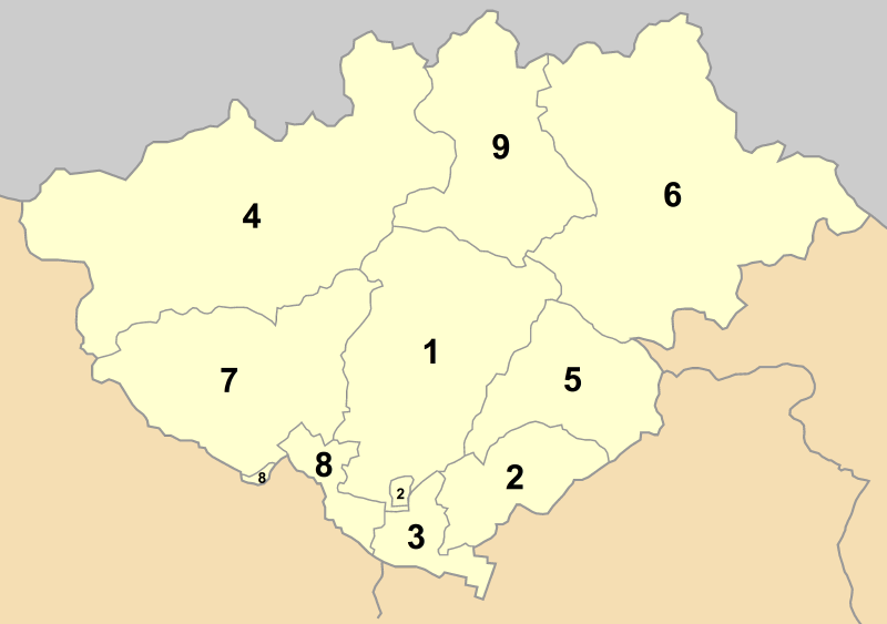 Map of Drama prefecture (Greece) with administrative divisions (municipalities and communities) numbered in alphabetical order (in greek). Legend: 1. Δήμος Δράμας - Drama 2. Δήμος Δοξάτου - Doxato 3. Δήμος Καλαμπακίου - Kalambaki 4. Δήμος Κάτω Νευροκοπίου - Kato Nevrokopi 5. Δήμος Νικηφόρου - Nikiforos 6. Δήμος Παρανεστίου - Paranesti 7. Δήμος Προσοτσάνης - Prosotsani 8. Δήμος Σιταγρών - Sitagri 9. Κοινότητα Σιδηρόνερου - Sidironero